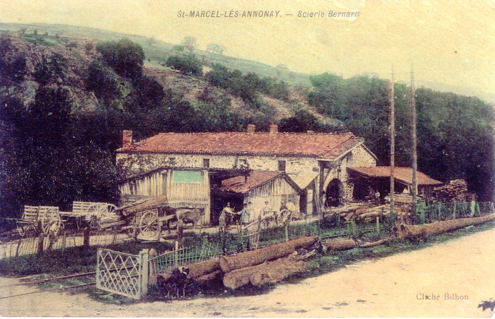 Saint-Marcel-lès-Annonay scierie